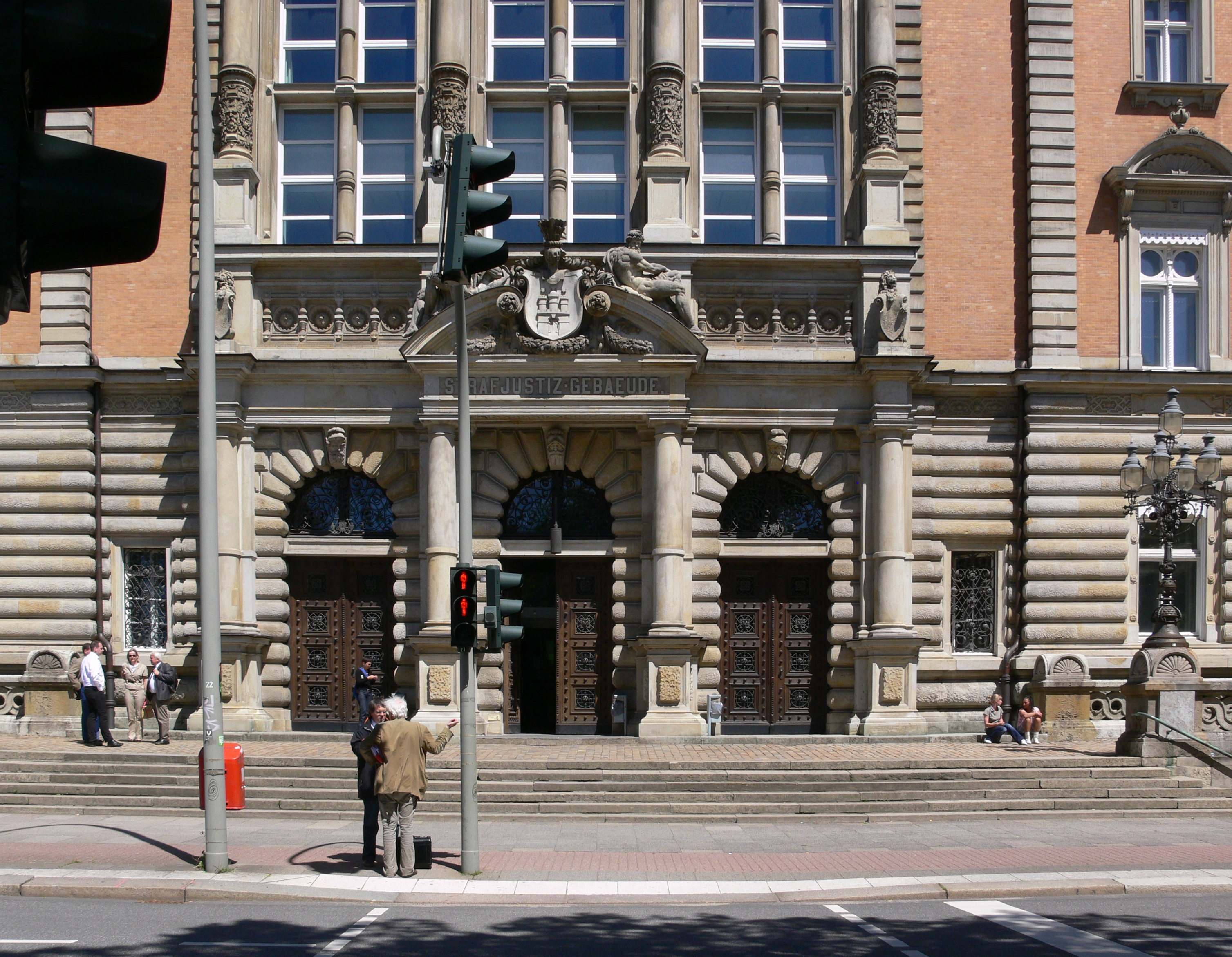 Strafjustizgebäude Hamburg